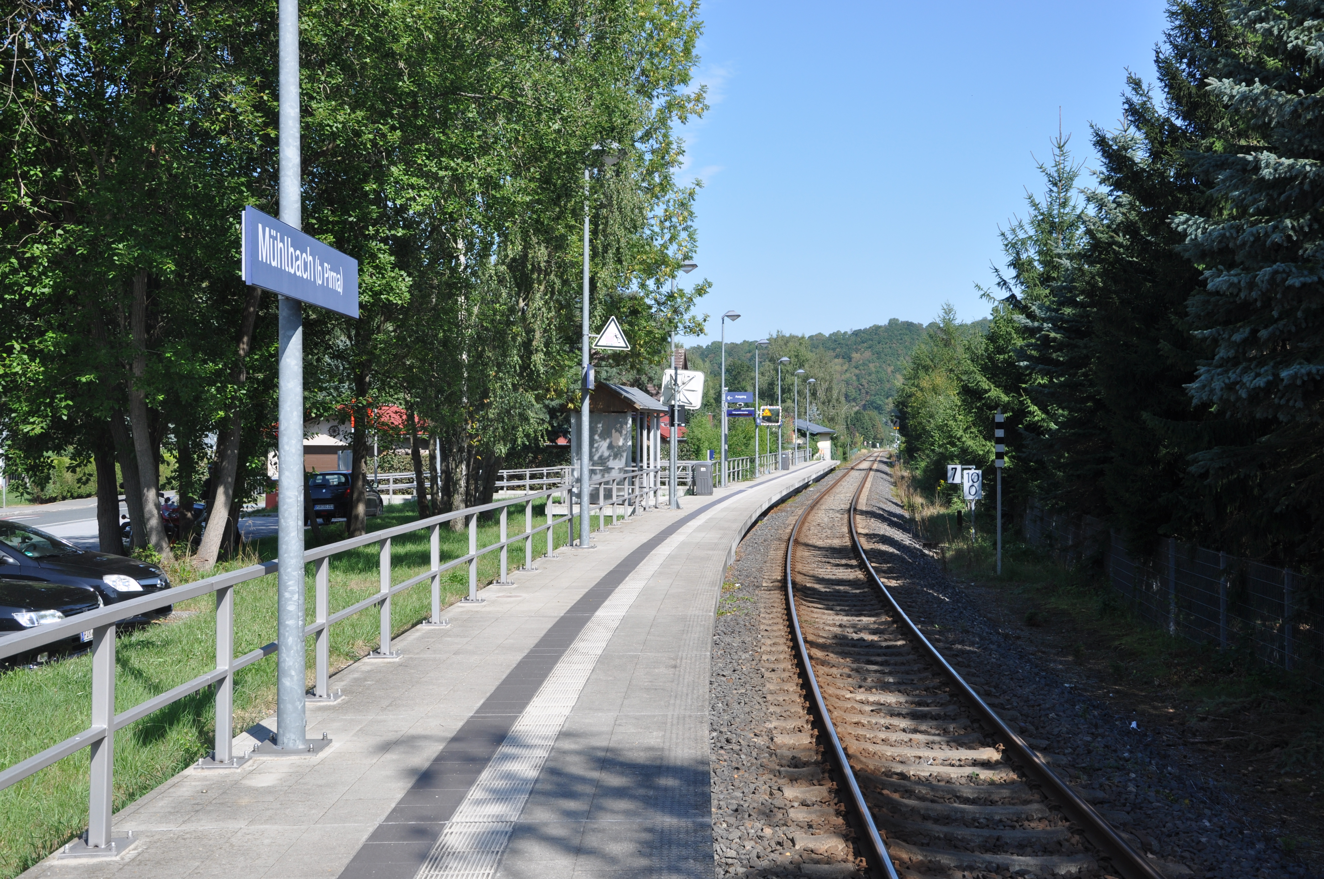 Haltepunkt Mühlbach, Müglitztalbahn